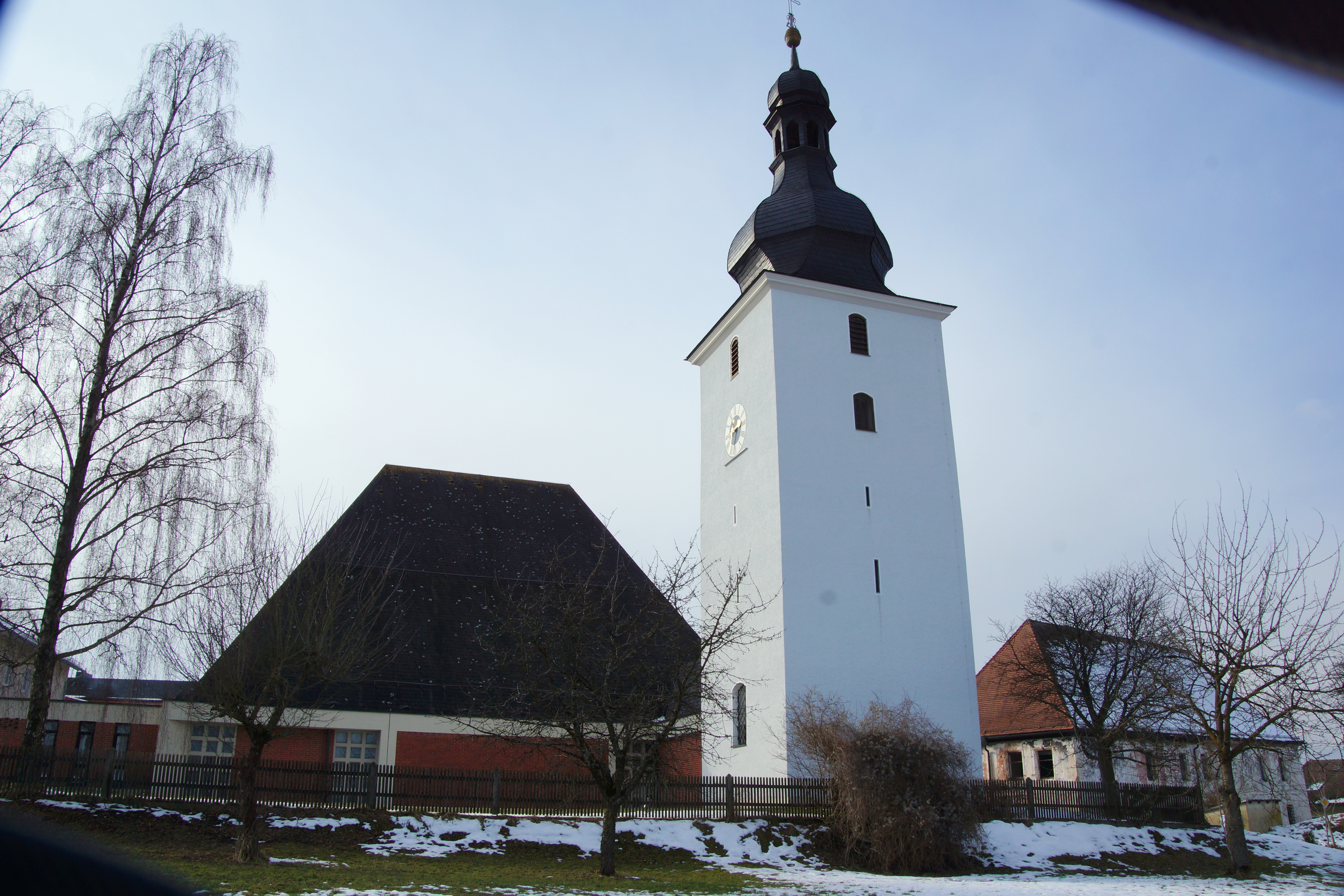 Die katholische Pfarrkirche Mariä Himmelfahrt in Hohenkemnath bei Amberg